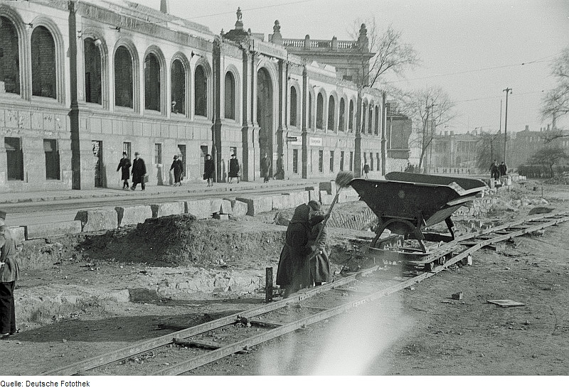 Original image description from the Deutsche FotothekTrümmerfrauen bei der Arbeit Vor dem zerstörten Fridericianum